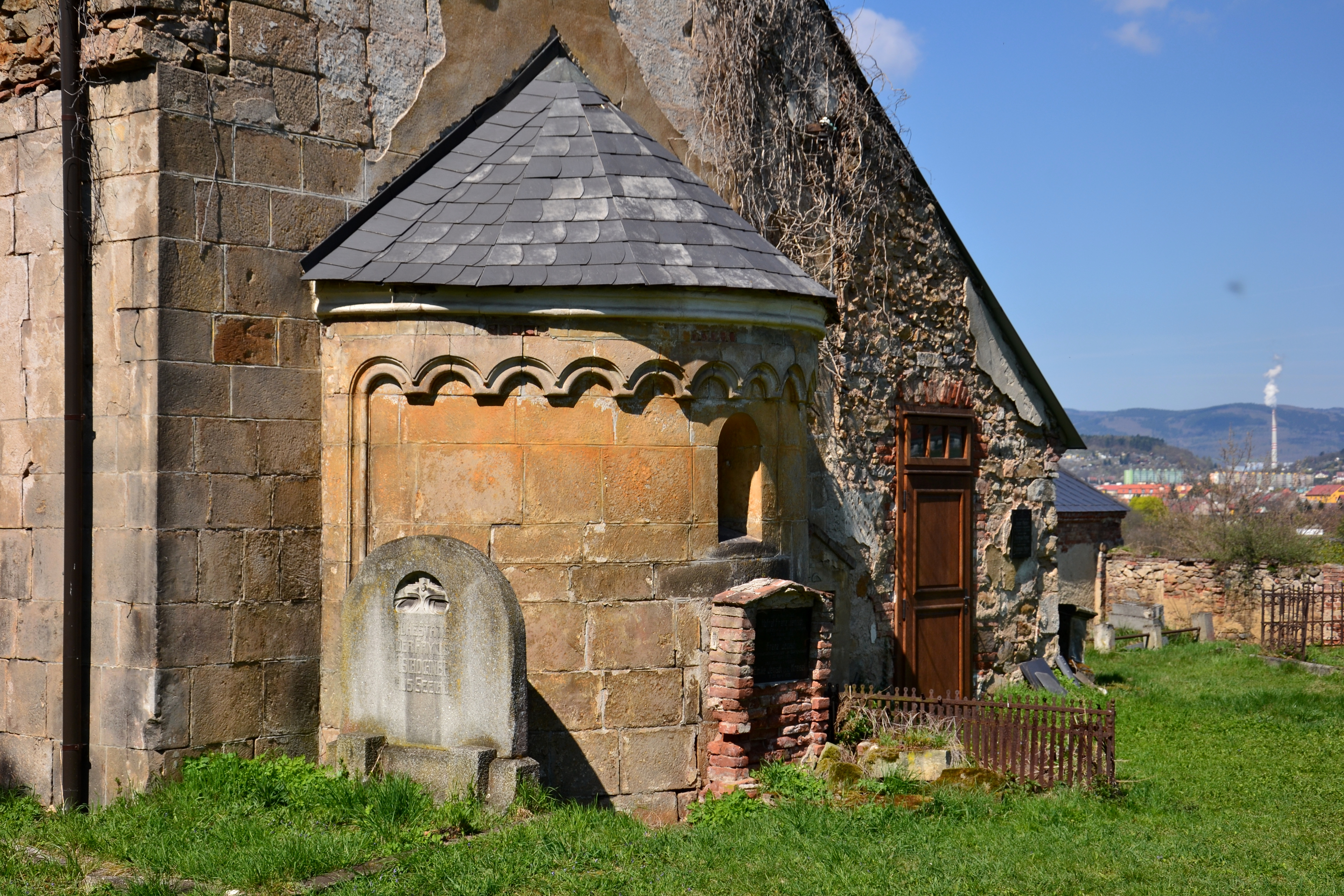 Apsida, Kostel svatého Vavřince, Želina.